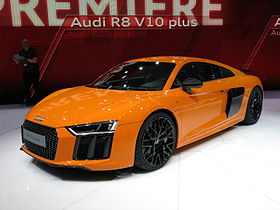 Audi R8 V10 plus